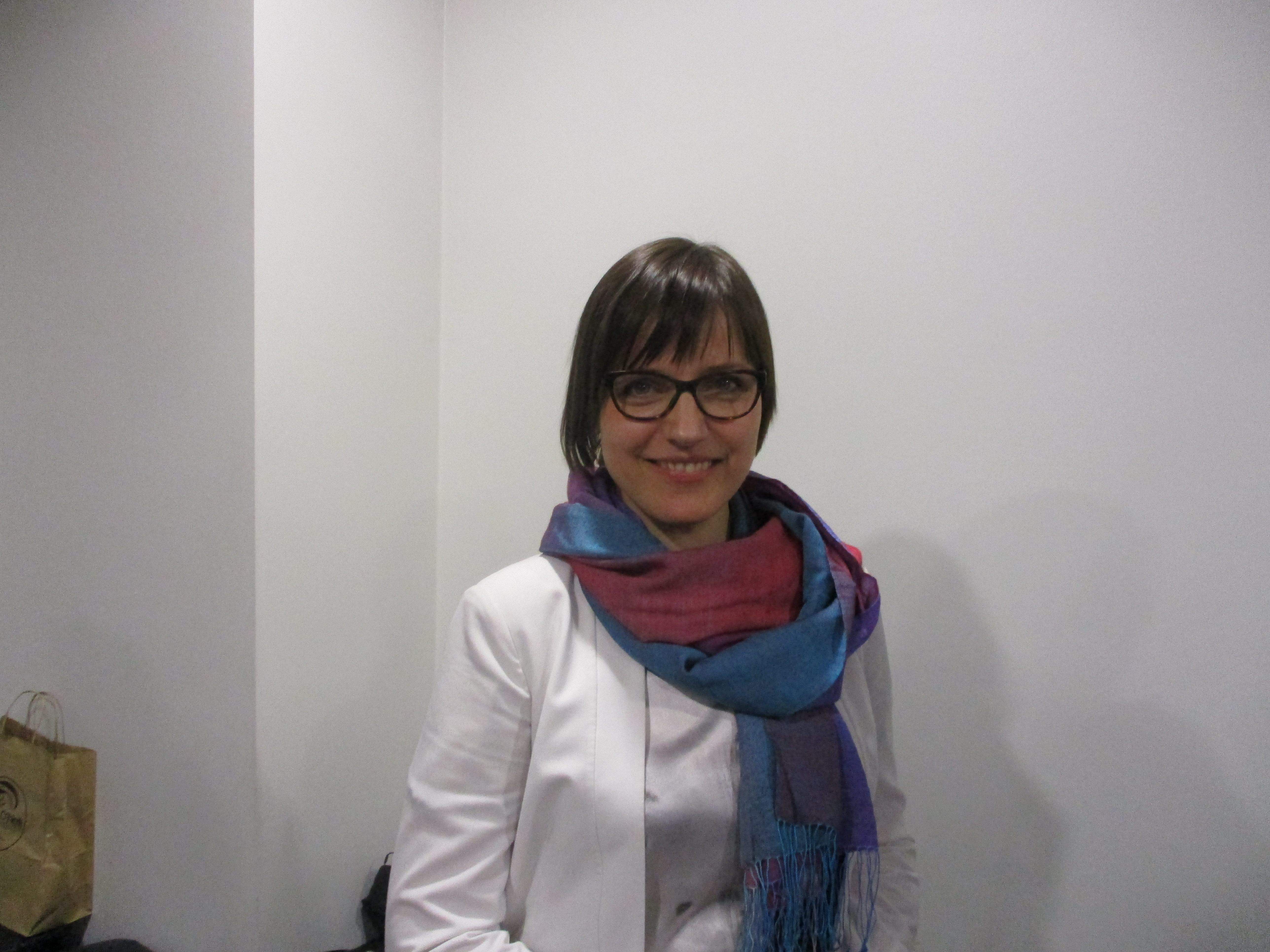 Anneli Ohvril Viljandis 23. veebruaril 2018 a.